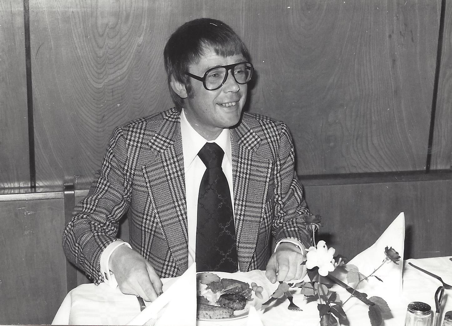 Prof. Dr. Lutz-Dietrich Leder in Essen.